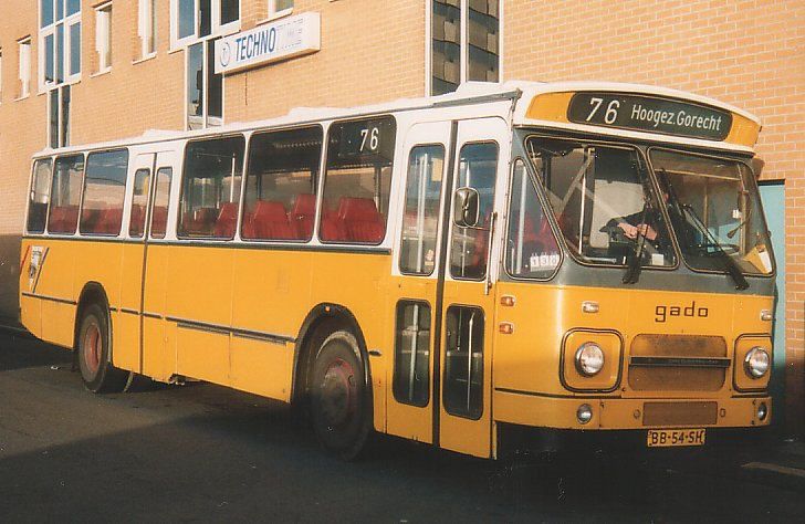 Gado bus 8899, Den Oudsten / DAF MB200DKDL564 te Groningen